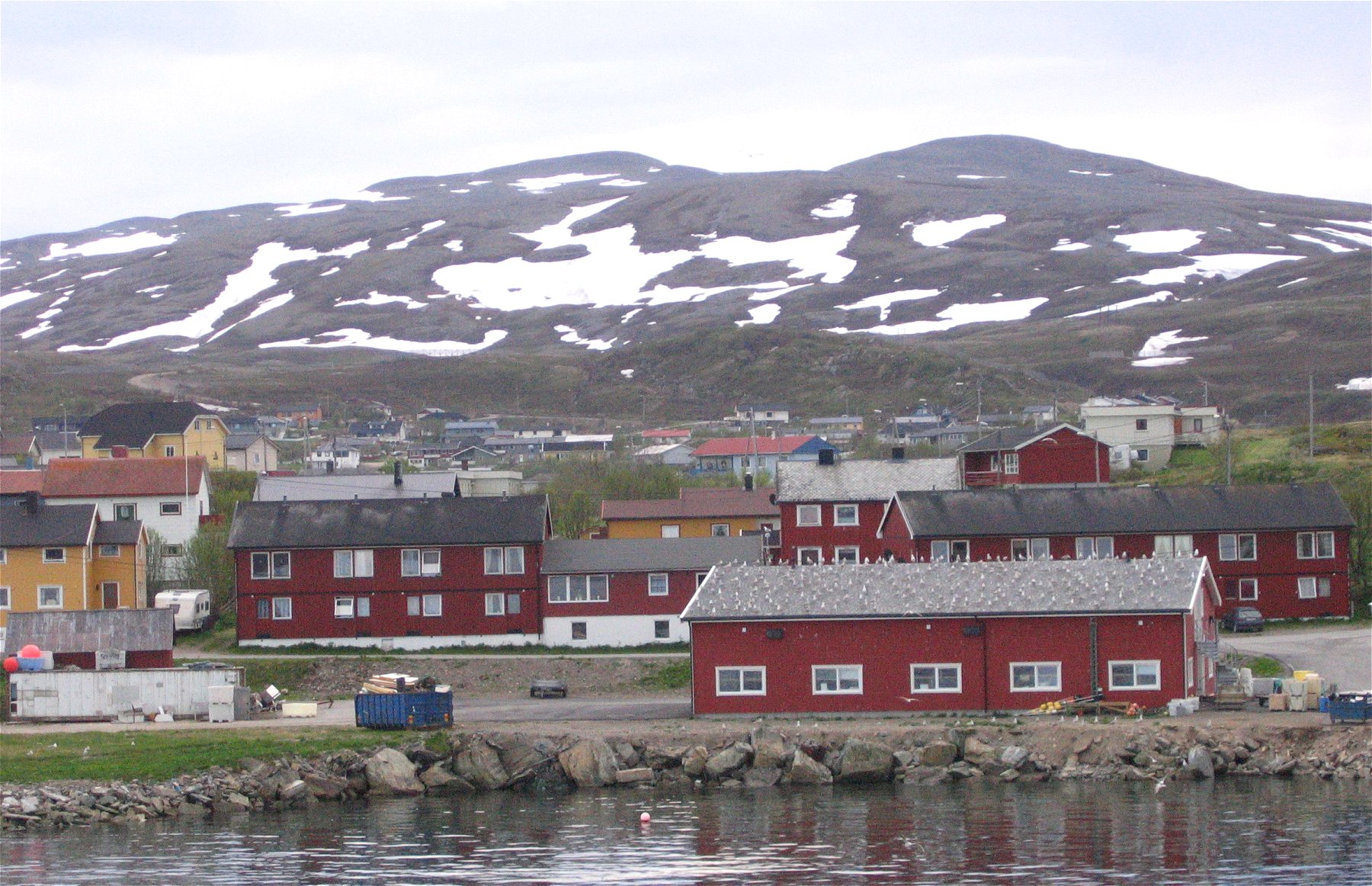 Båtsfjord, Norwegen